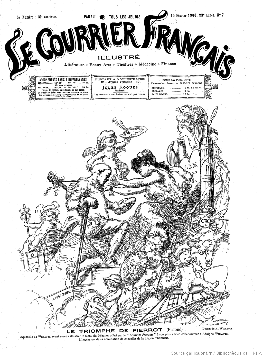 Couverture du courrier français du 15 février 1906.